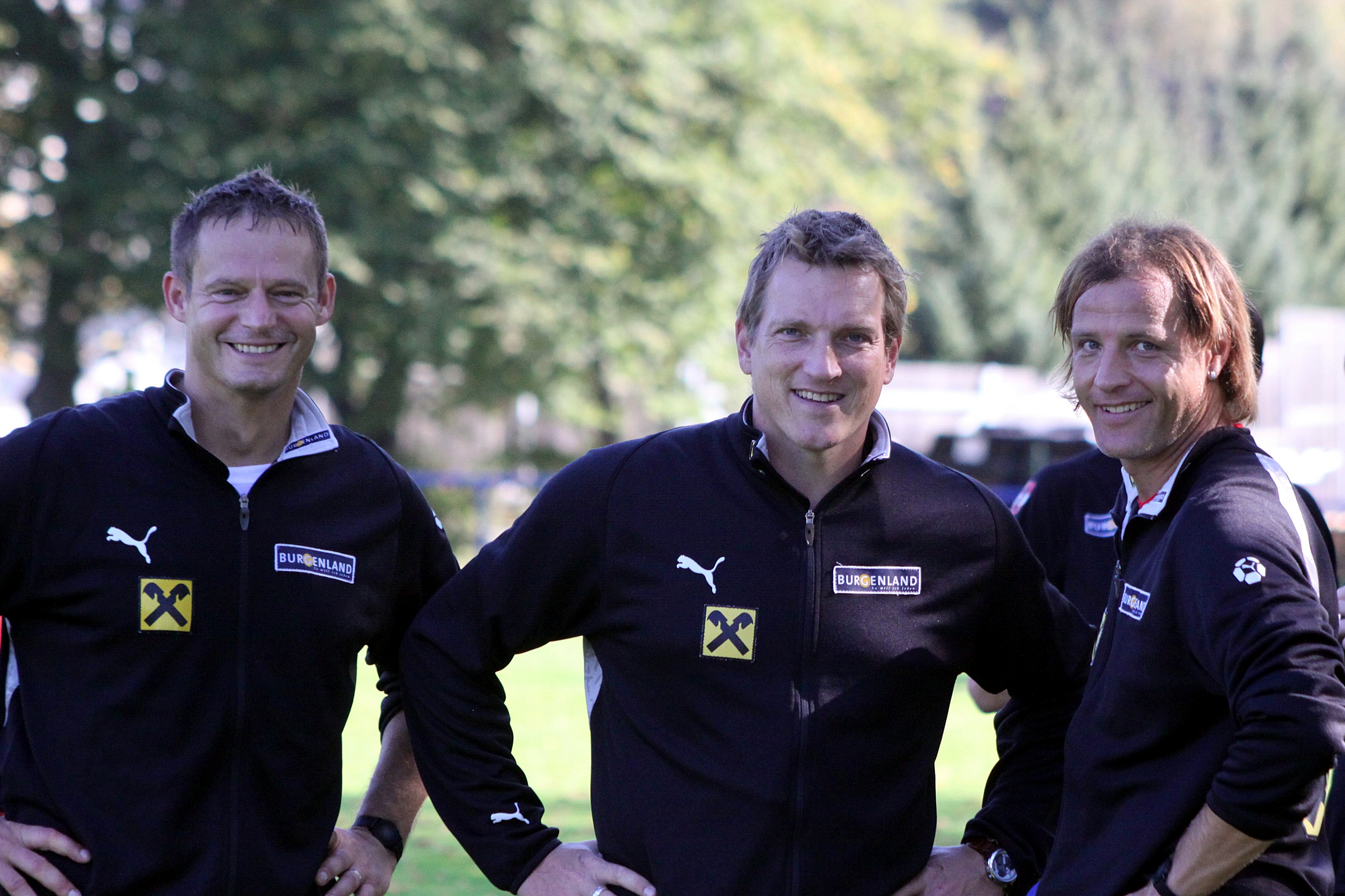 Trainerstab Österreichische U-21-Fußballnationalmannschaft - Otto Konrad (Tormanntrainer, links), Andreas Herzog (Teamchef, Mitte), Heimo Pfeifenberger (Co-Trainer, rechts) (1) Coaches of Austria national under-21 football team - Otto Konrad (Goalkeepers, left), Andreas Herzog (Teamchef, middle), Heimo Pfeifenberger (Assistent Coach, right)